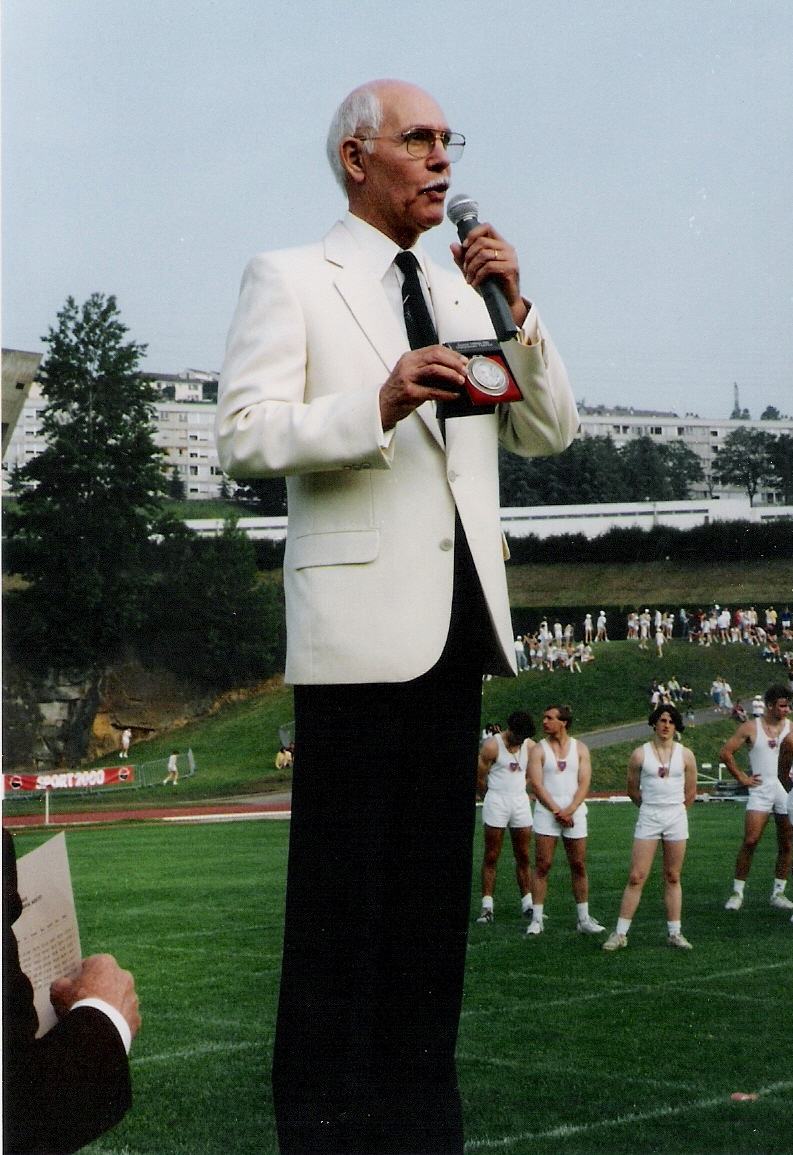 Jean Boucher, président de la commission nationale FSCF de gymnastique masculine